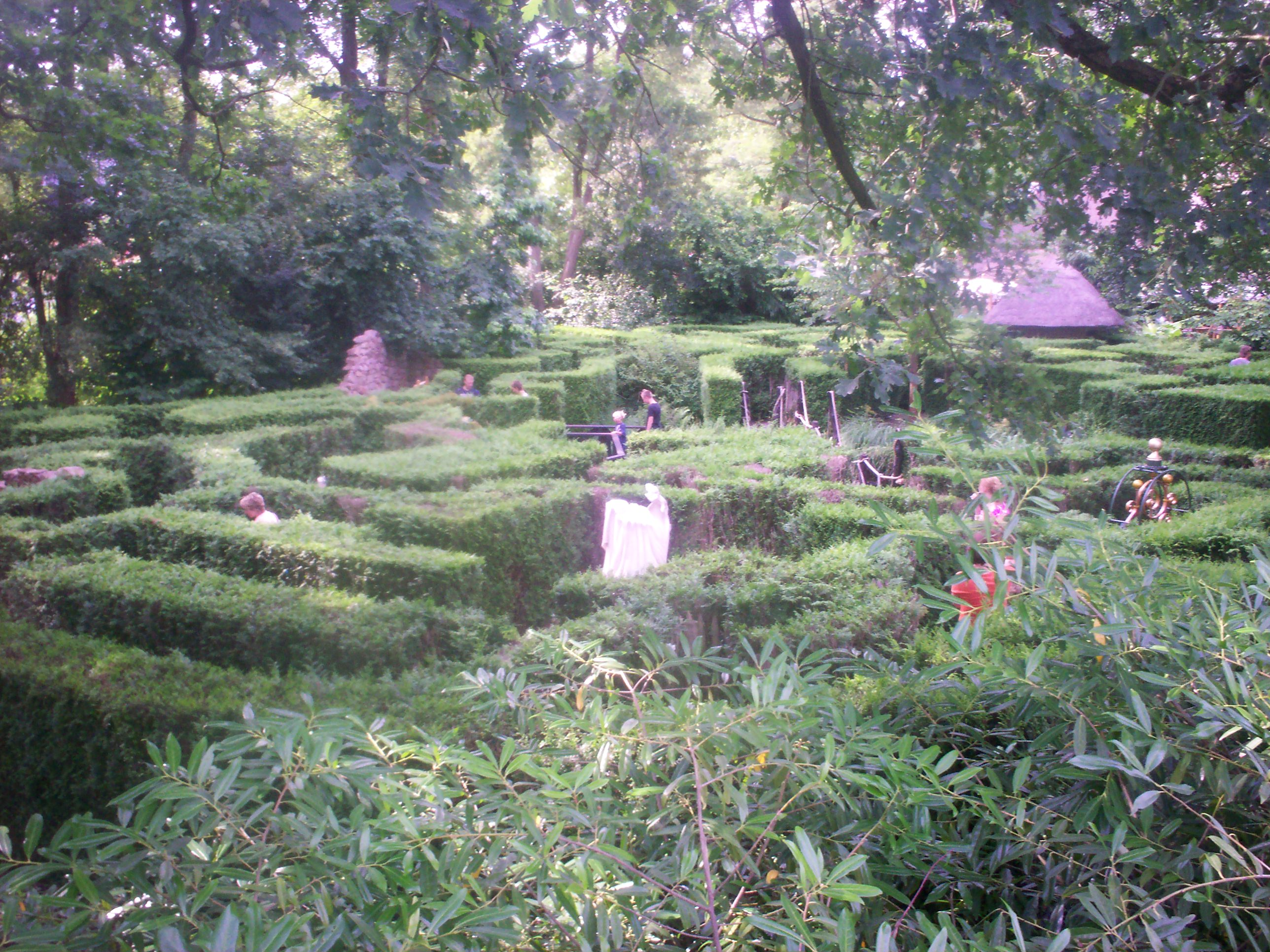 Foto Avonturen Doolhof